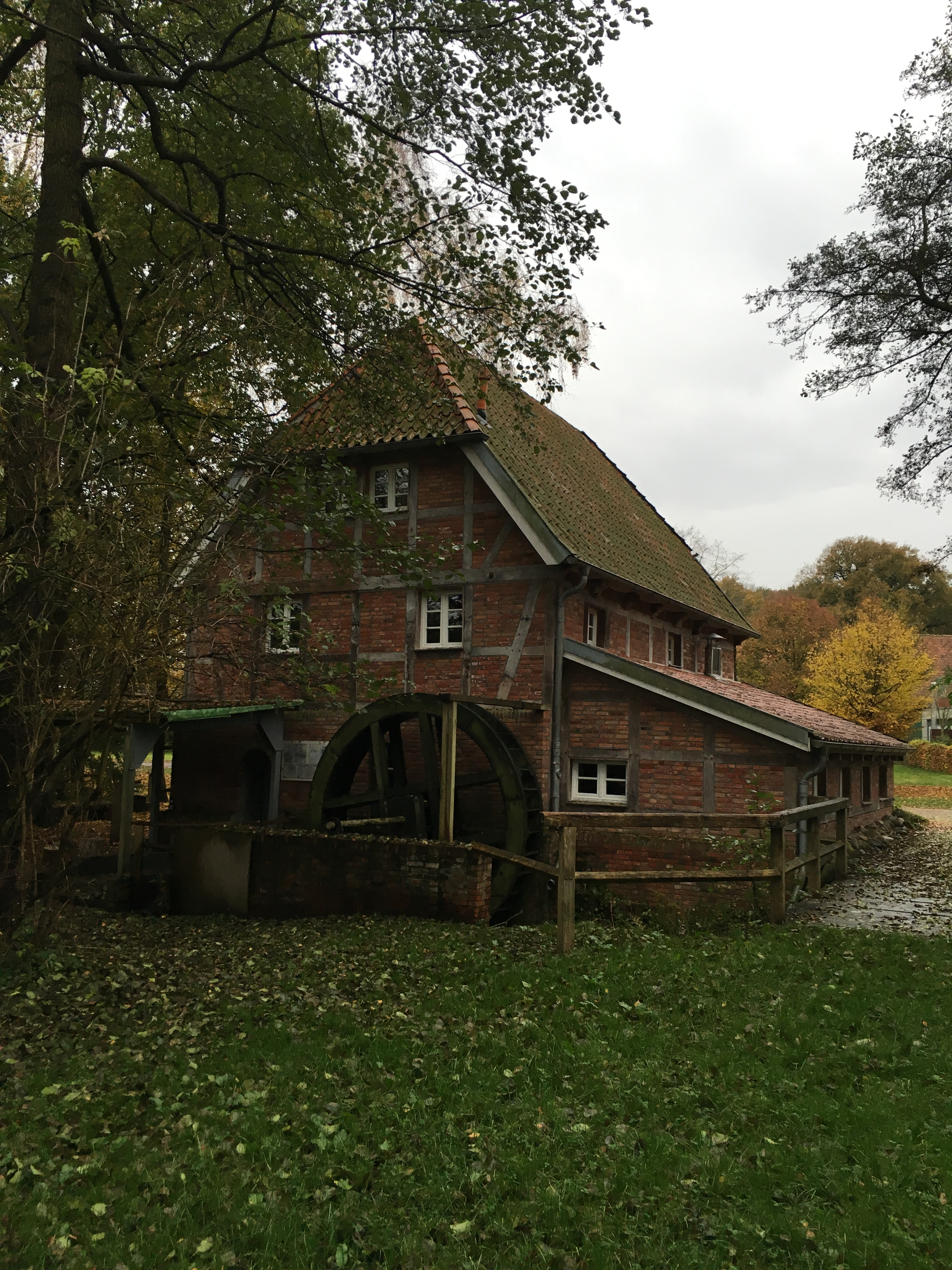 Möhl in Breedmeh, Alfst